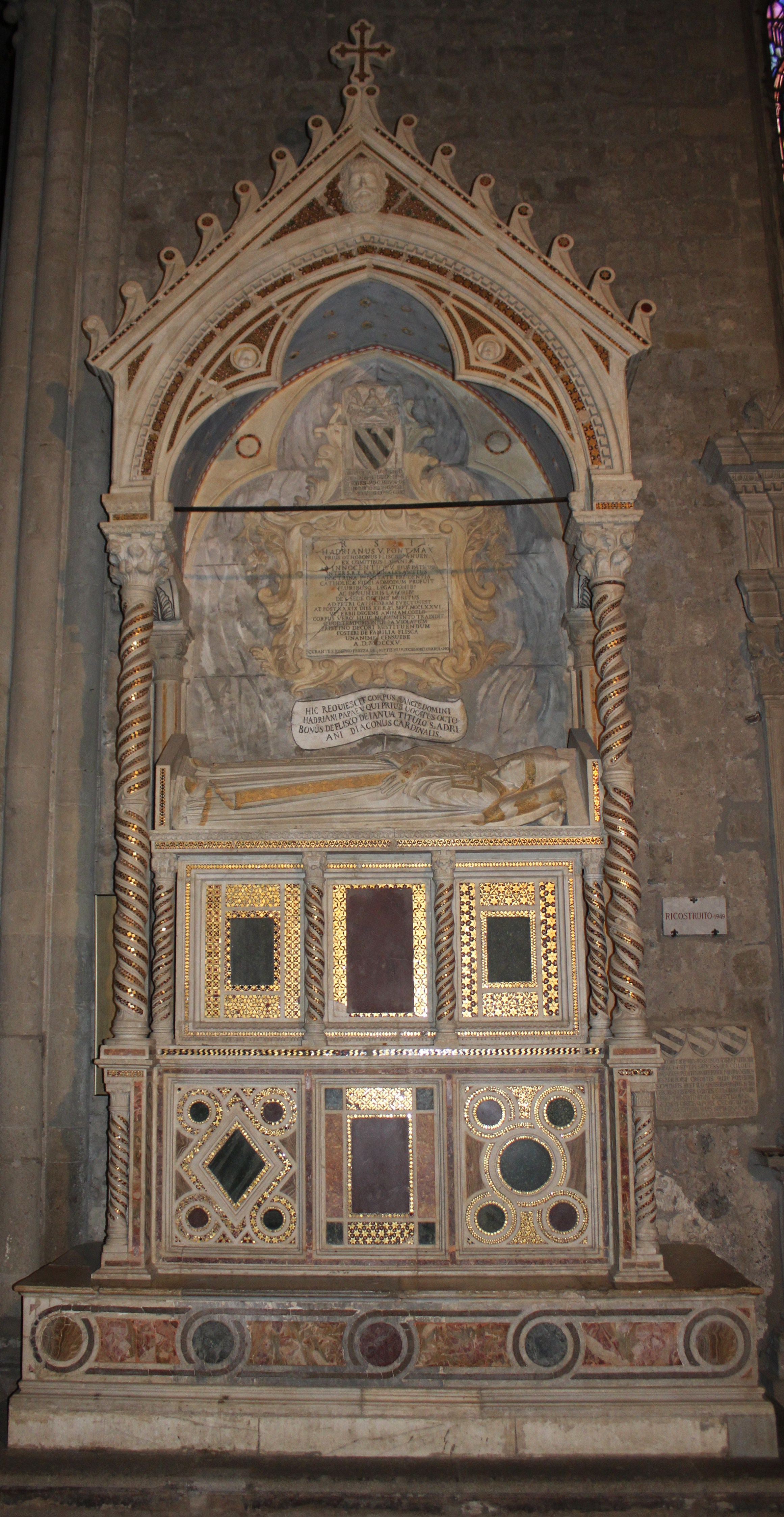 Mausoleo funebre di Adriano V, Arnolfo di Cambio, XIII sec., Basilica San Francesco alla Rocca, Viterbo.